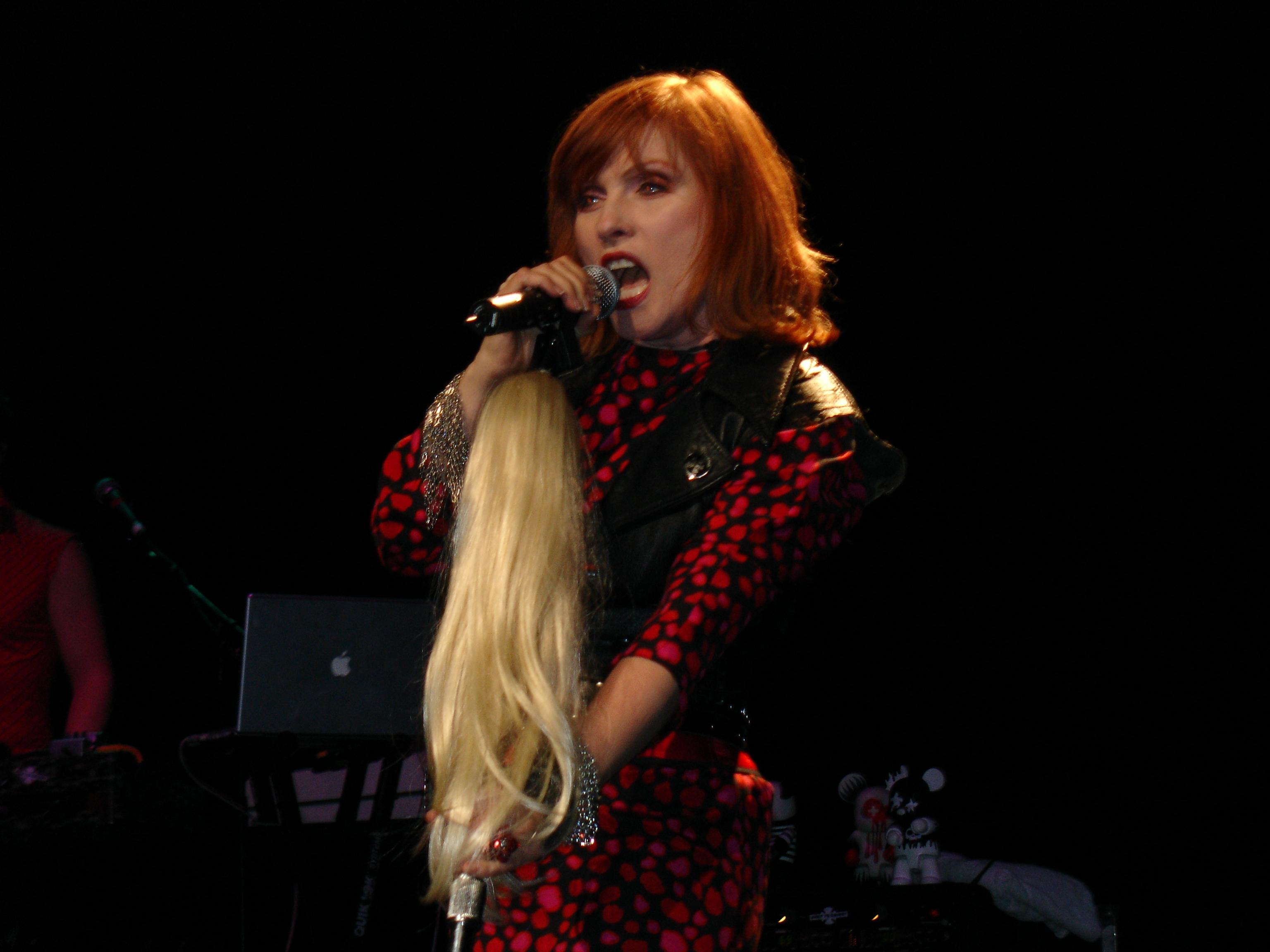 Blondie (Debbie Harry) in Dublin, december 2005